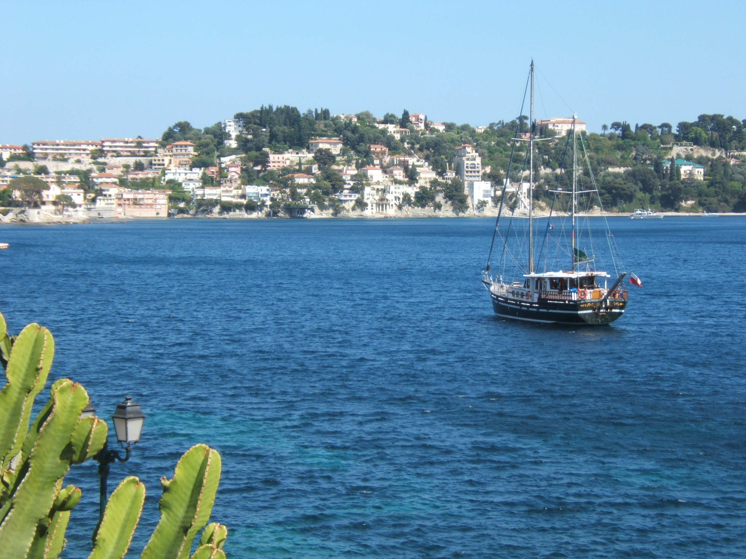 La baie de Villefranche-sur-Mer dans les Alpes-Maritimes.